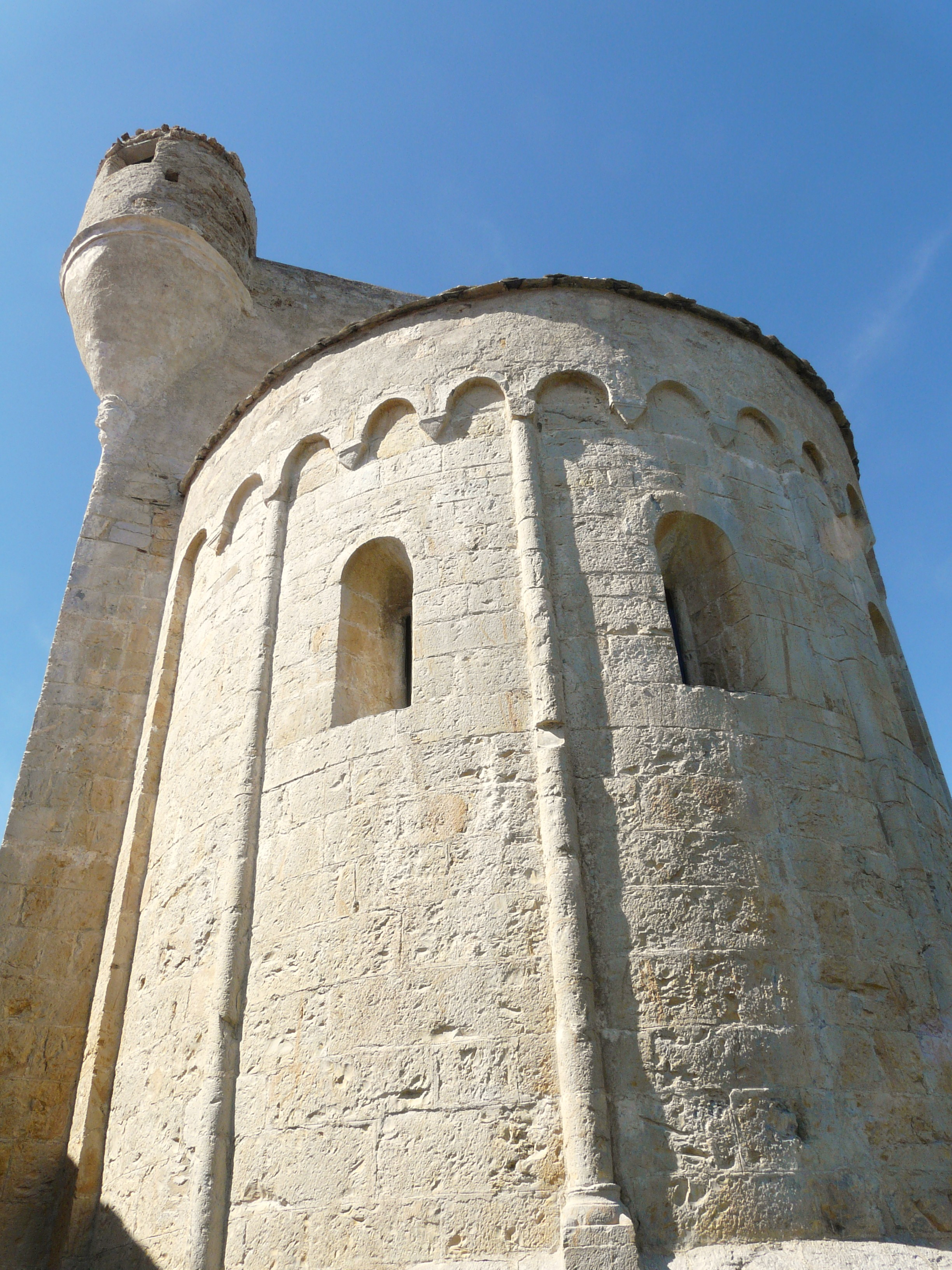 Chiesa e fortezza di San Pietro, Lingueglietta, Cipressa, Liguria, Italia